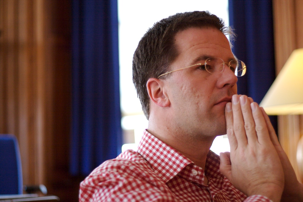 Portret van VVD leider Mark Rutte in zijn kantoor bij de tweede kamer. Genomen tijdens zijn allerlaatste interview als staatsecretaris Hoger Onderwijs van het Ministerie van Onderwijs, Cultuur en Wetenschappen. Opdrachtgever: Scienceguide.nl